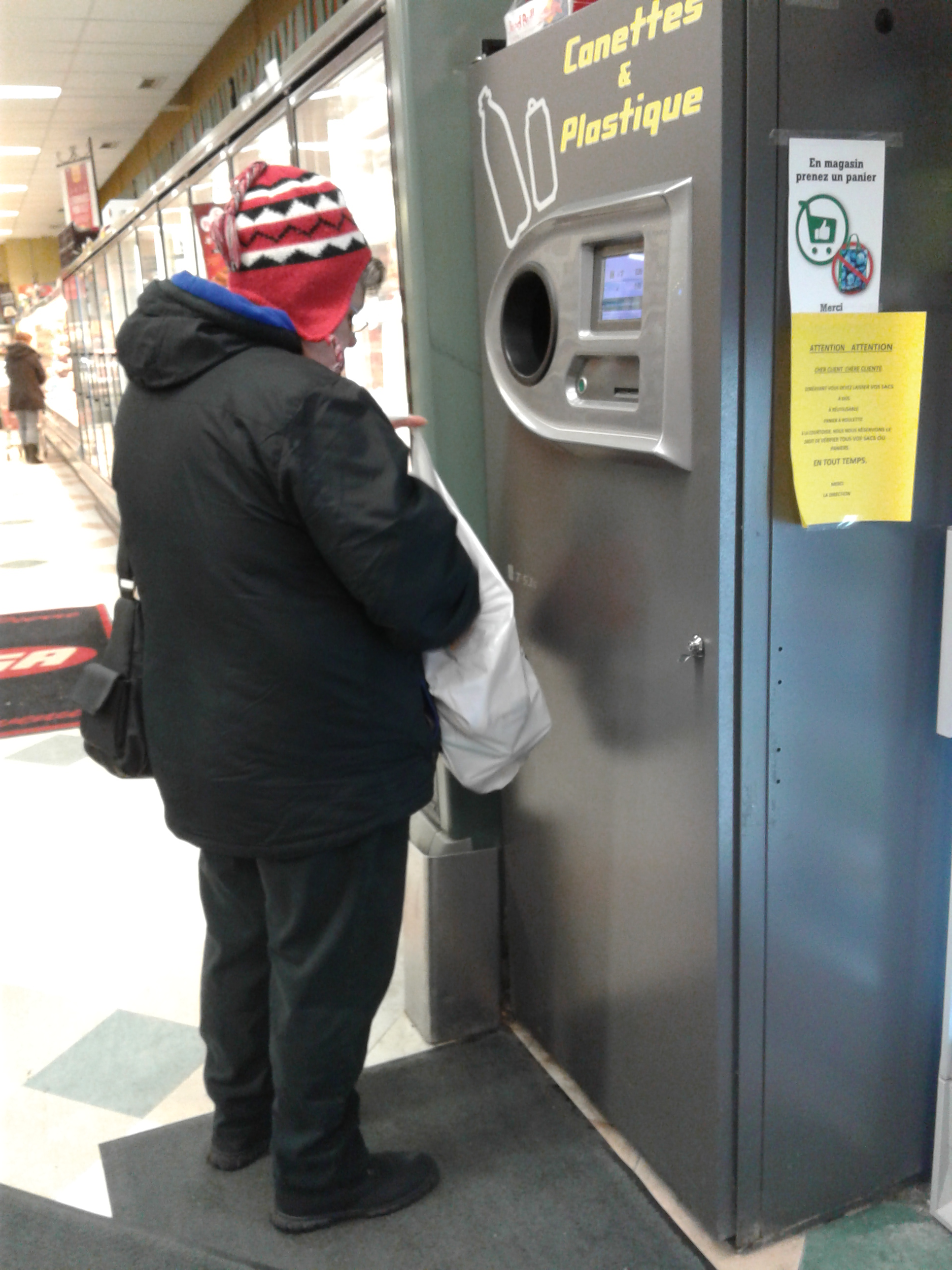 IGA Marché Claude St-Pierre, 6675, boulevard Monk, quartier Ville-Émard, Montréal